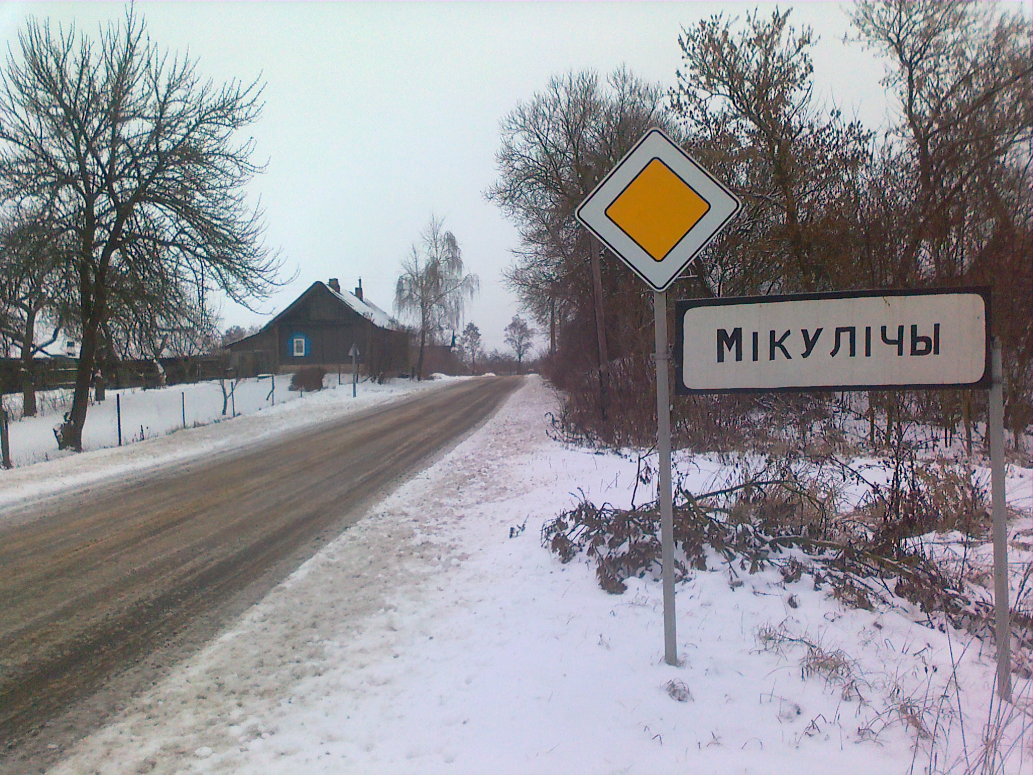 деревня Микуличи